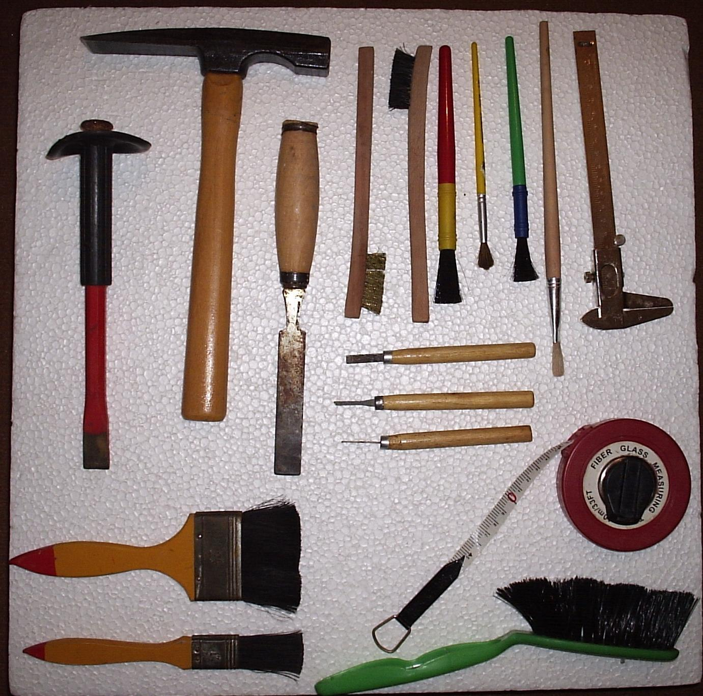 Material de campo de um paleontólogo